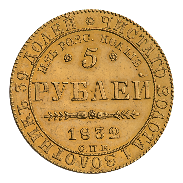 Пять рублей 1832 г. Памятная монета (реверс). ГМ 102.VII.2; Биткин 884 (R2). Внутри точечного ободка обозначение номинала ❀ 5 ❀ РУБЛЕЙ; под фигурной чертой дата 1832 и С. П. Б. — знак Санкт-Петербургского монетного двора. Над обозначением номинала полукругом расположена мемориальная надпись: ИЗЪ РОЗС. КОЛЫВ. Круговая надпись: * ЧИСТАГО ЗОЛОТА 1 ЗОЛОТНИКЪ 39 ДОЛЕЙ